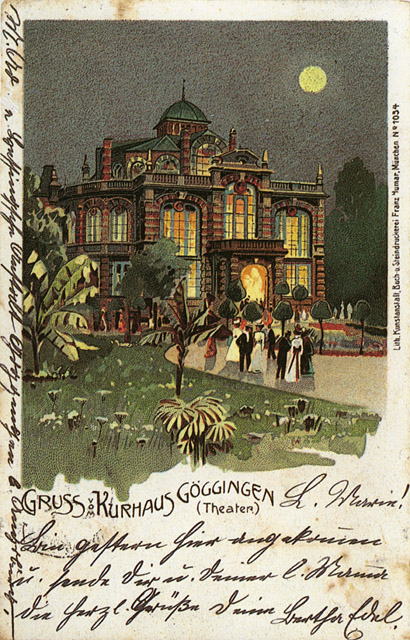 Postkarte Kurhaus Augsburg-Goeggingen 1910